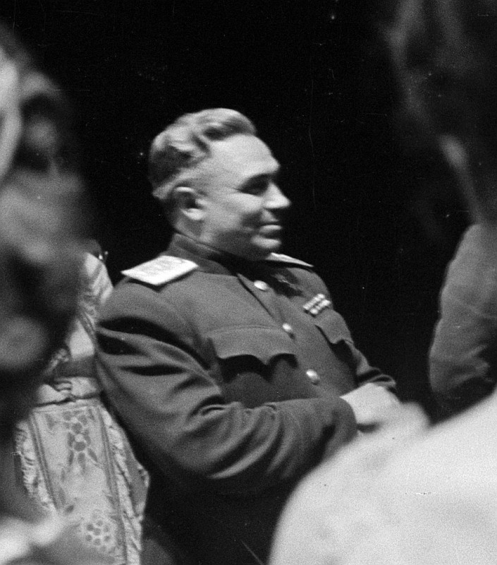 Original image description from the Deutsche Fotothek Tanzszenen